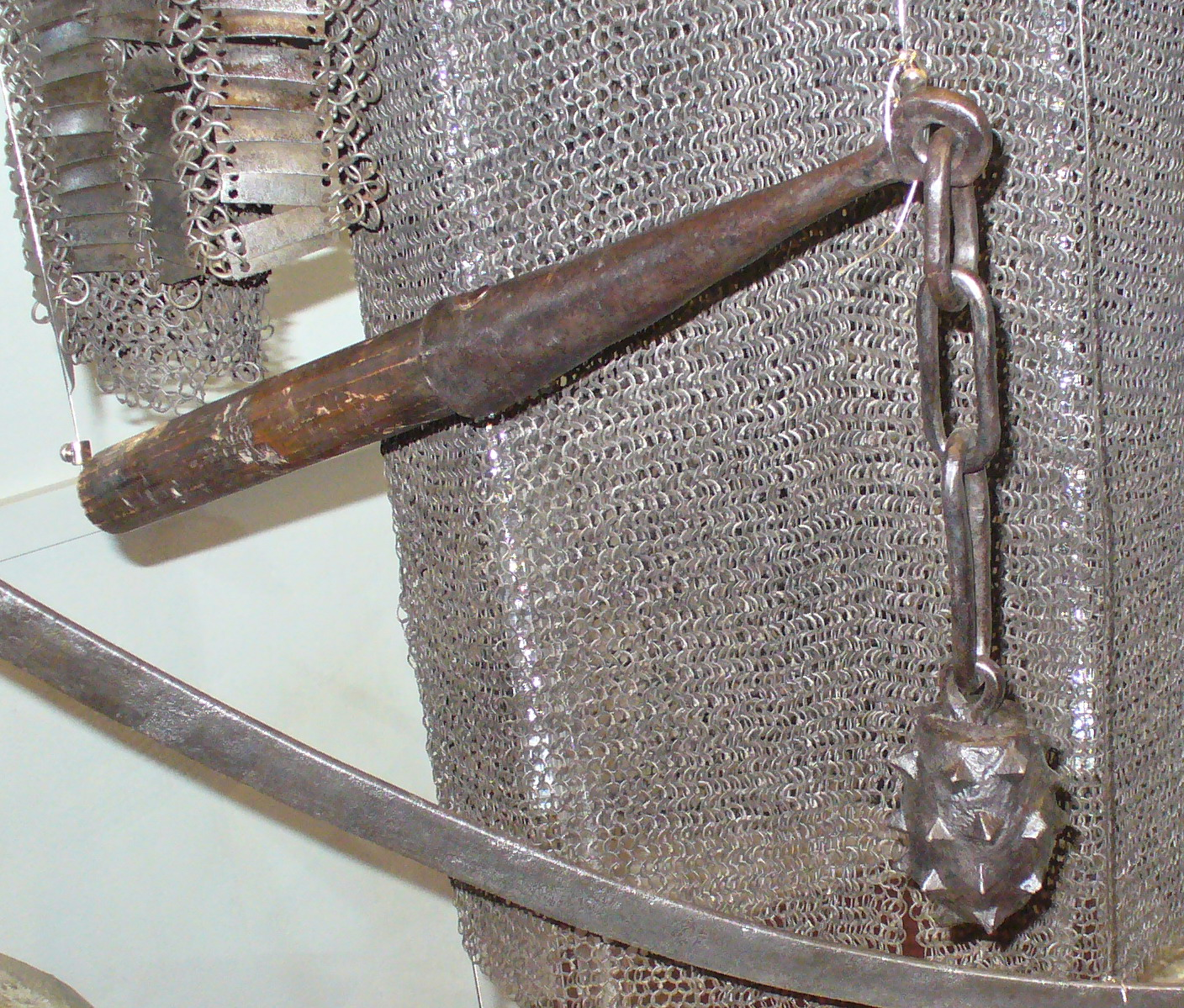 Кистень. Россия, XVII век.